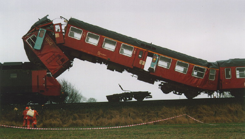 Frontal kollision ved Regstrup station